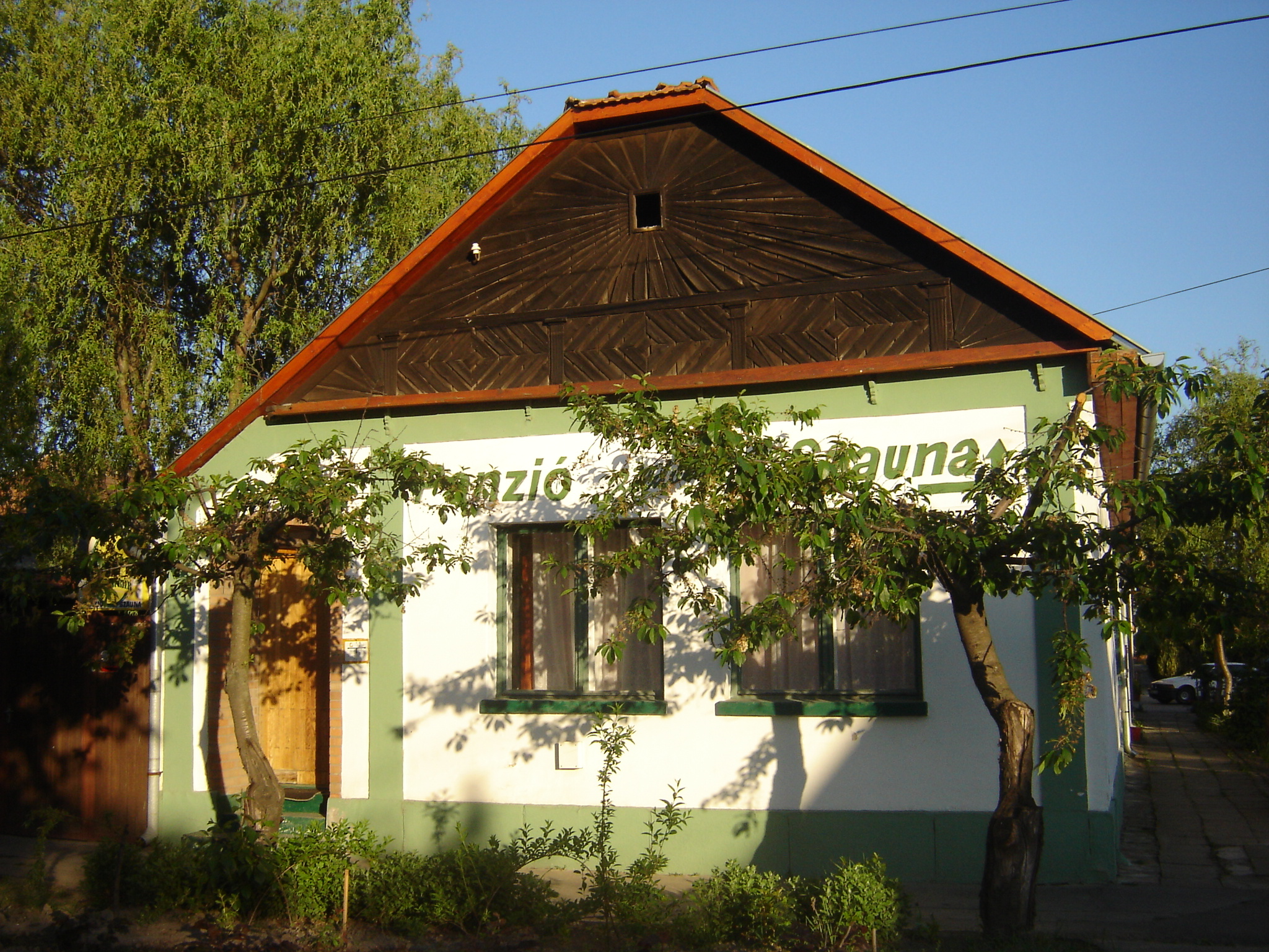 Felújított napsugaras panzió fákkal, Tisza Lajos utca, Szeged-Alsóváros